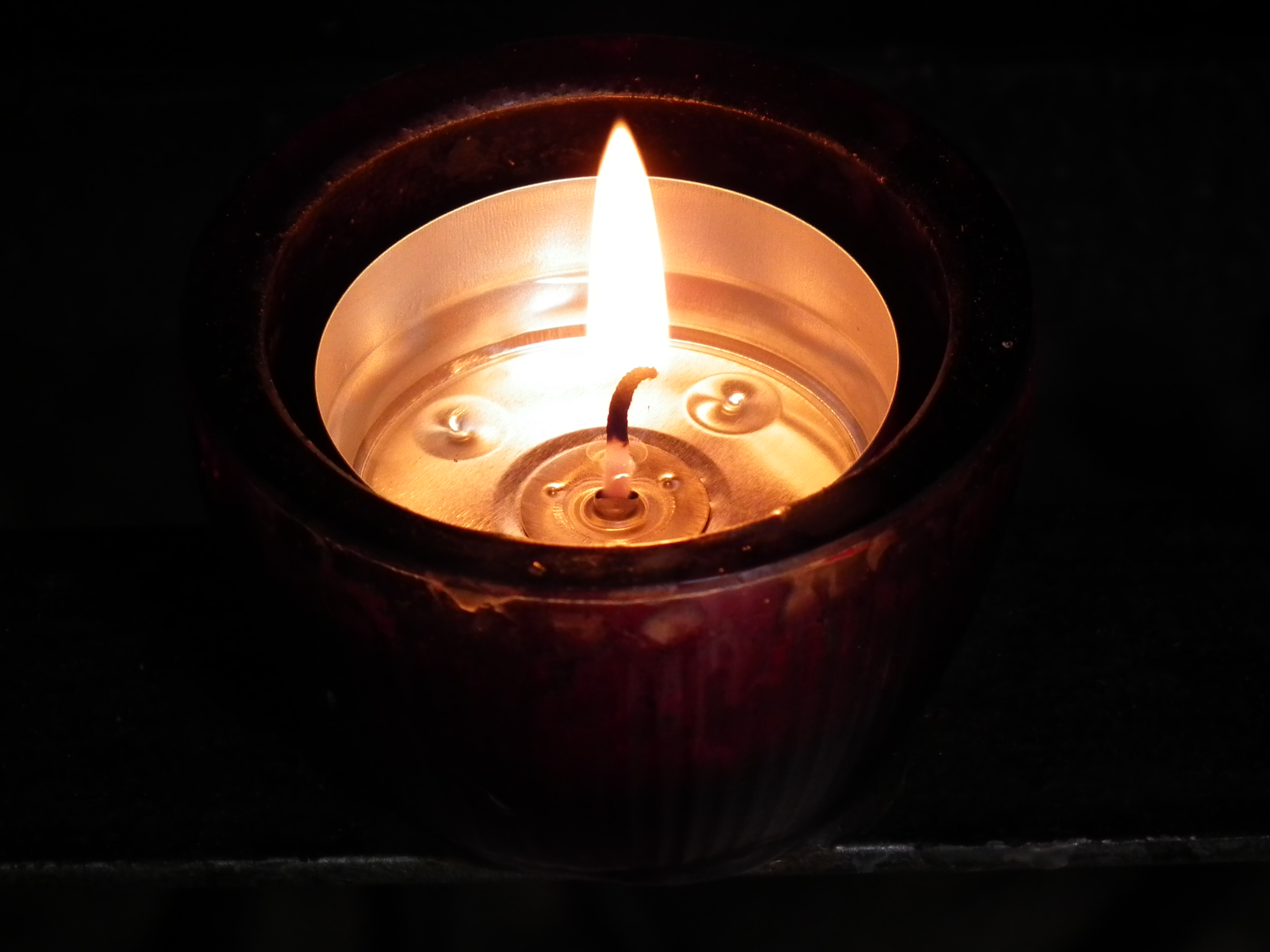 Opferlicht